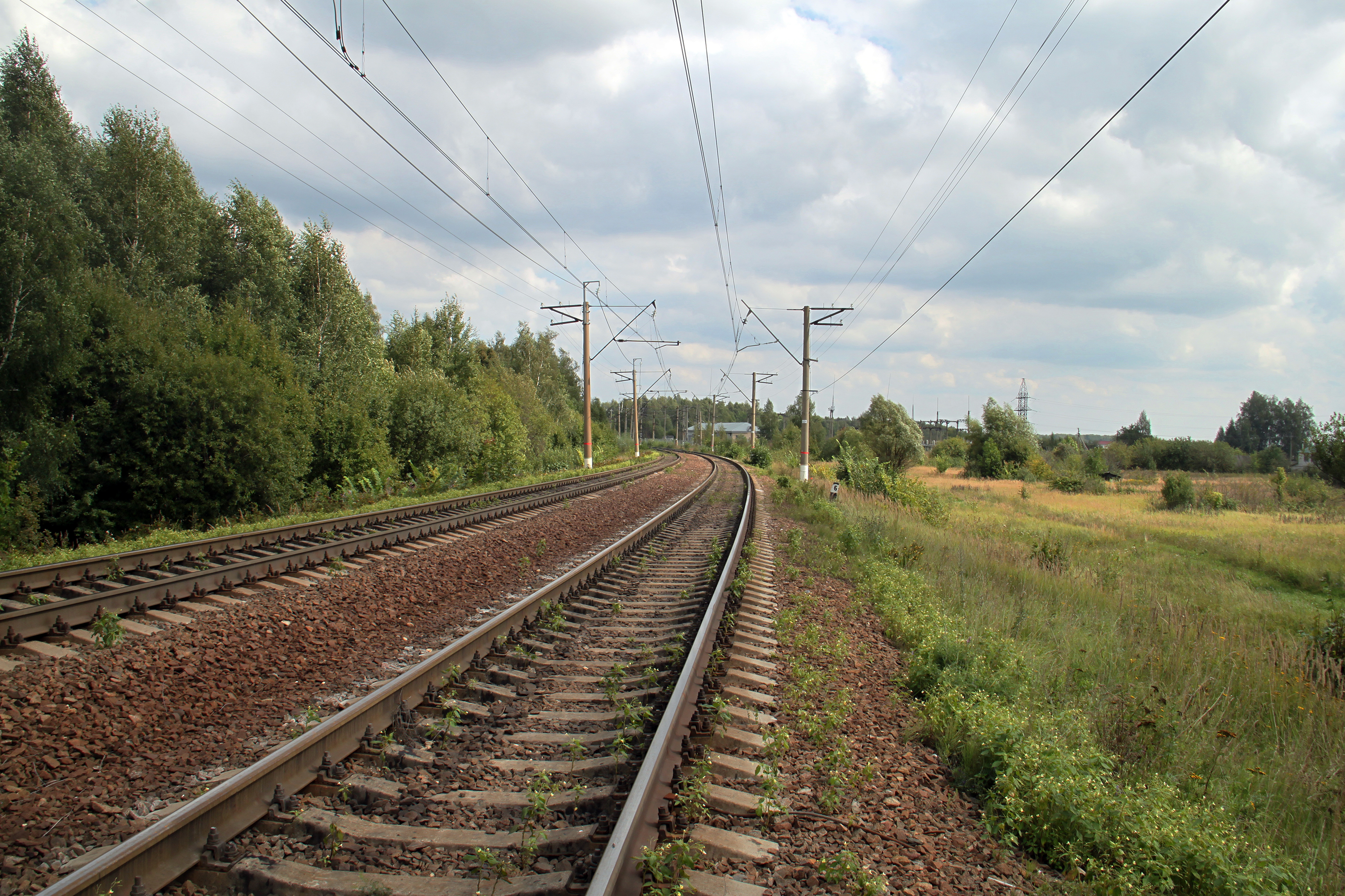 Хордовая линия Узуново-Рыбное, двухпутный перегон между постами 53 км и 59 км, вид в сторону пл.Козловка